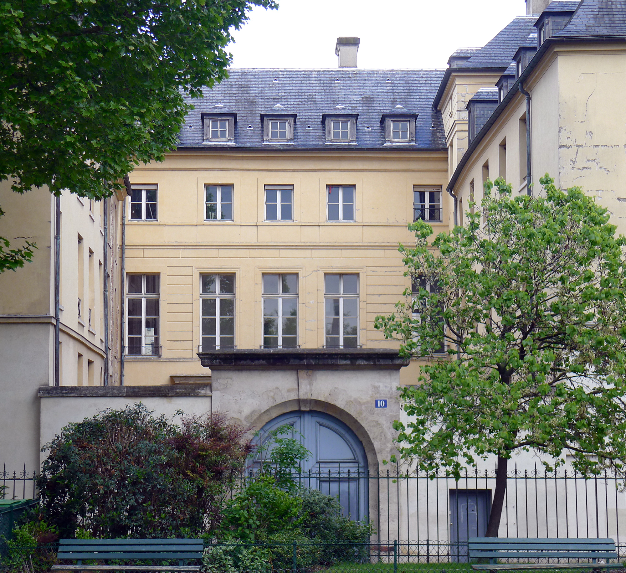 Hôtel de Vigny (InscritInscrit) - n°10 rue du Parc-Royal - Paris III .